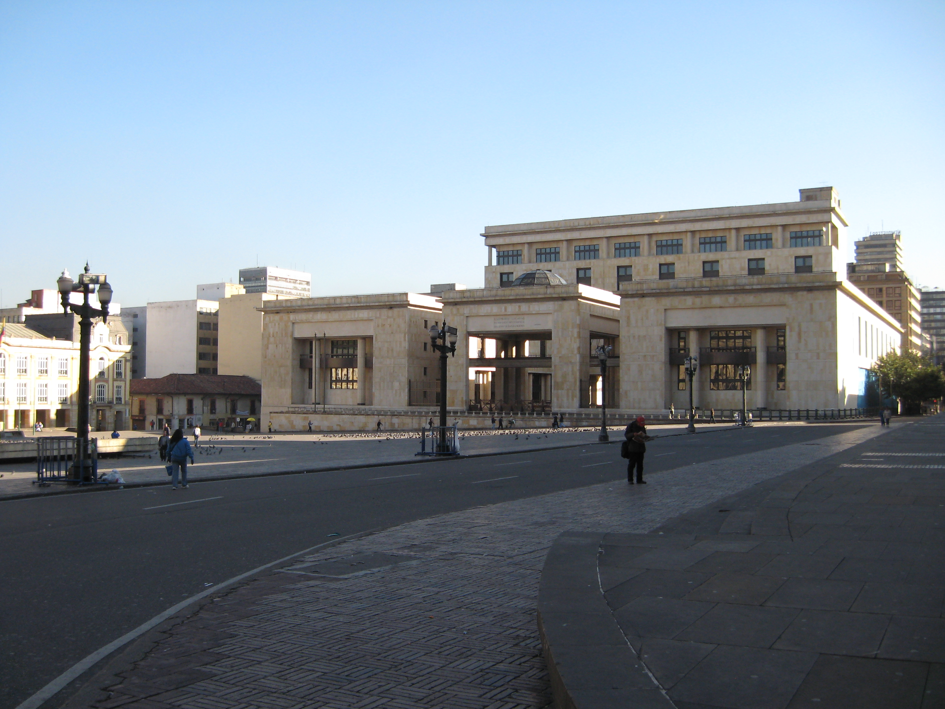 Nuevo Palacio de Justicia en Bogotá Colombia